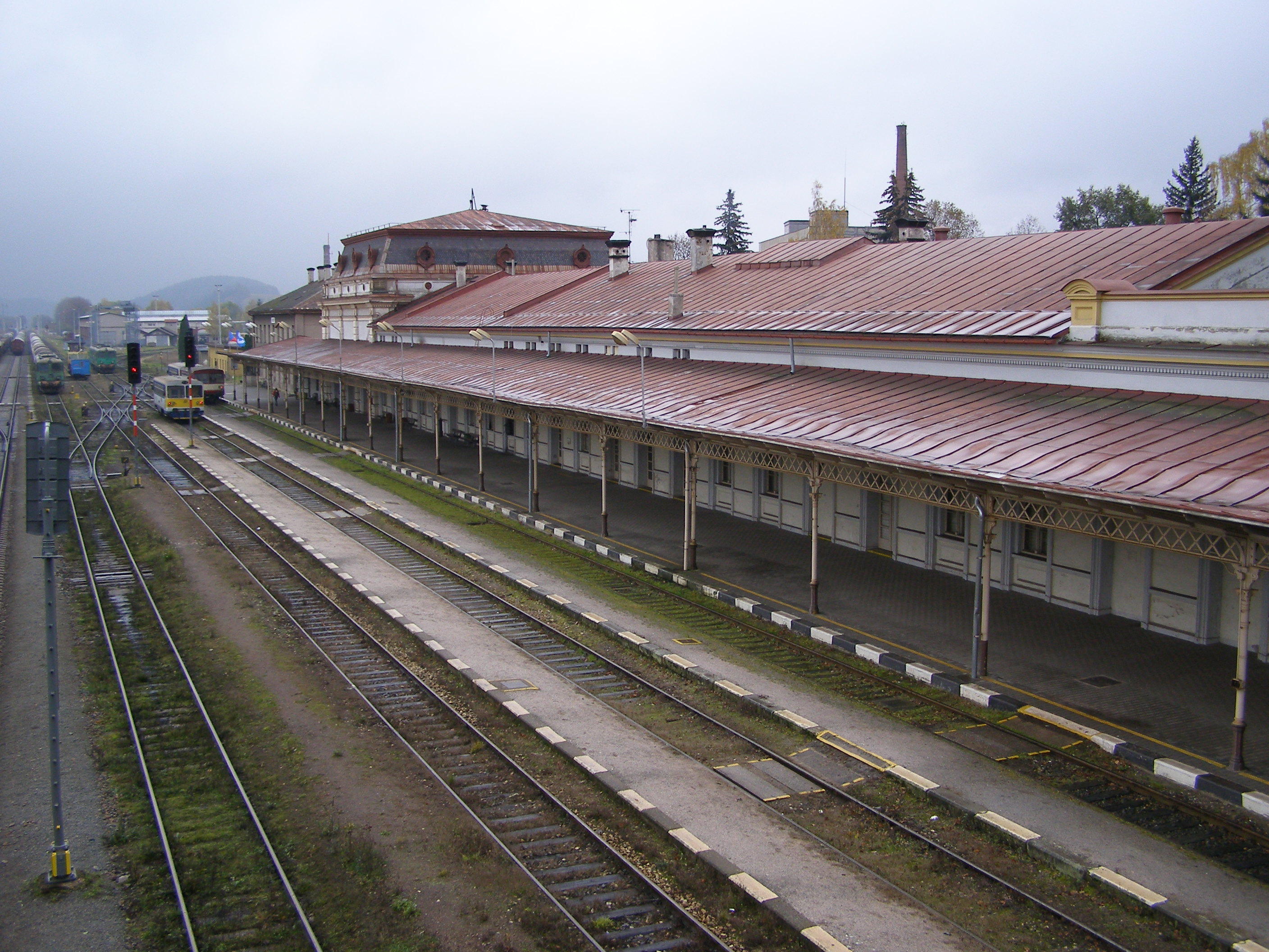 Meziměstí - vlakové nádraží / railway-station